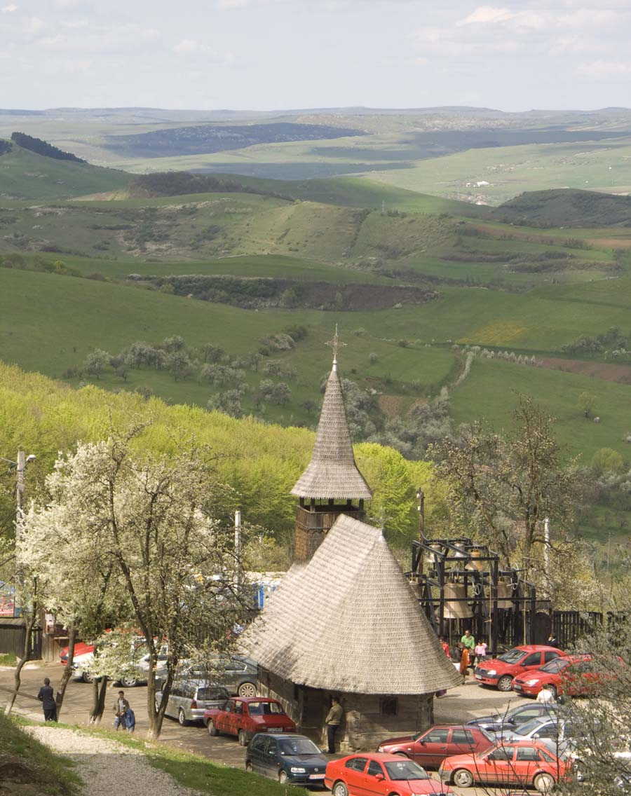 Biserica de lemn din Năsal Fânaţe, din 1974 în incinta Mănăstirii Nicula, 2008